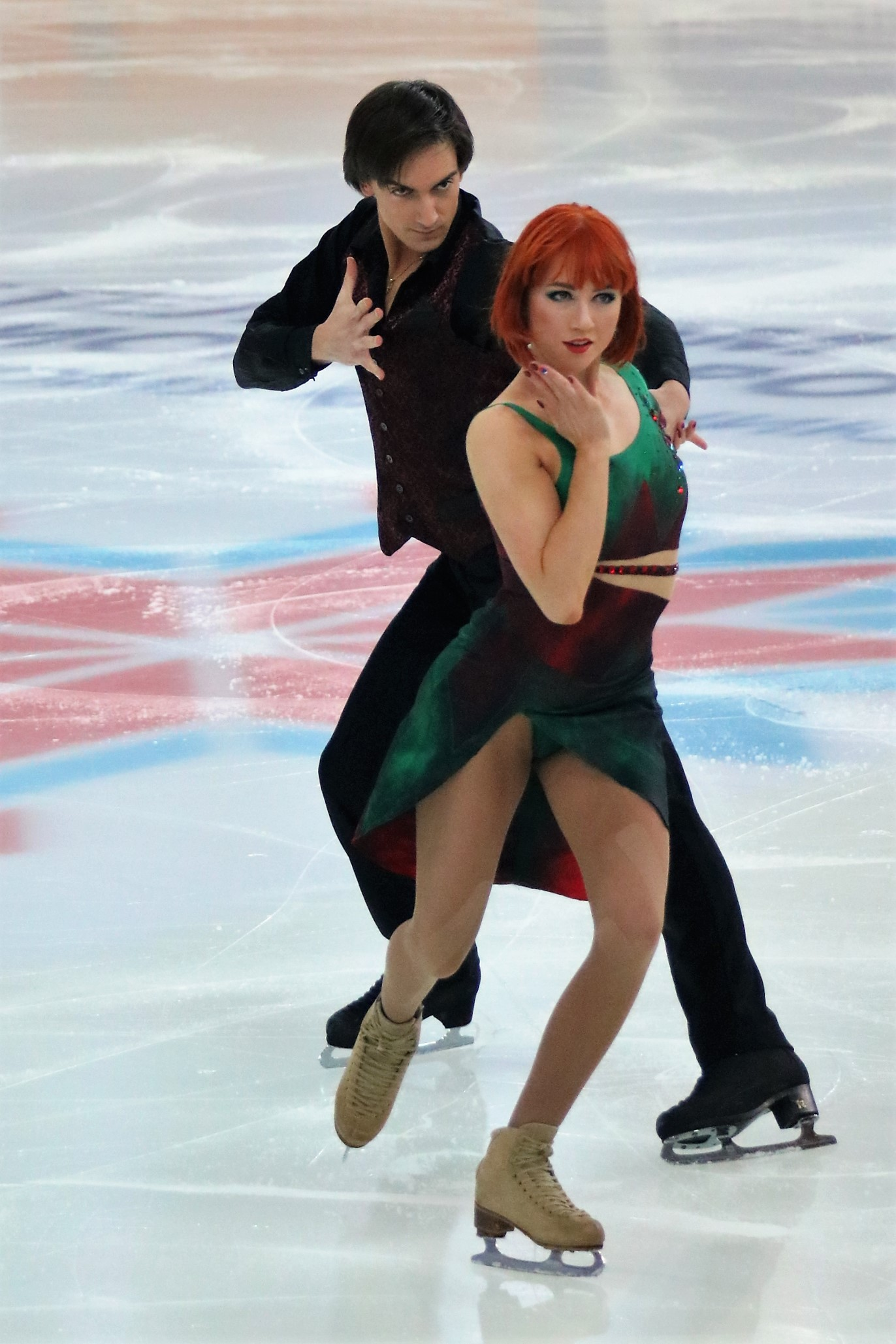 Тиффани Загорски / Джонатан Гурейро на чемпионате России по фигурному катанию на коньках 2019